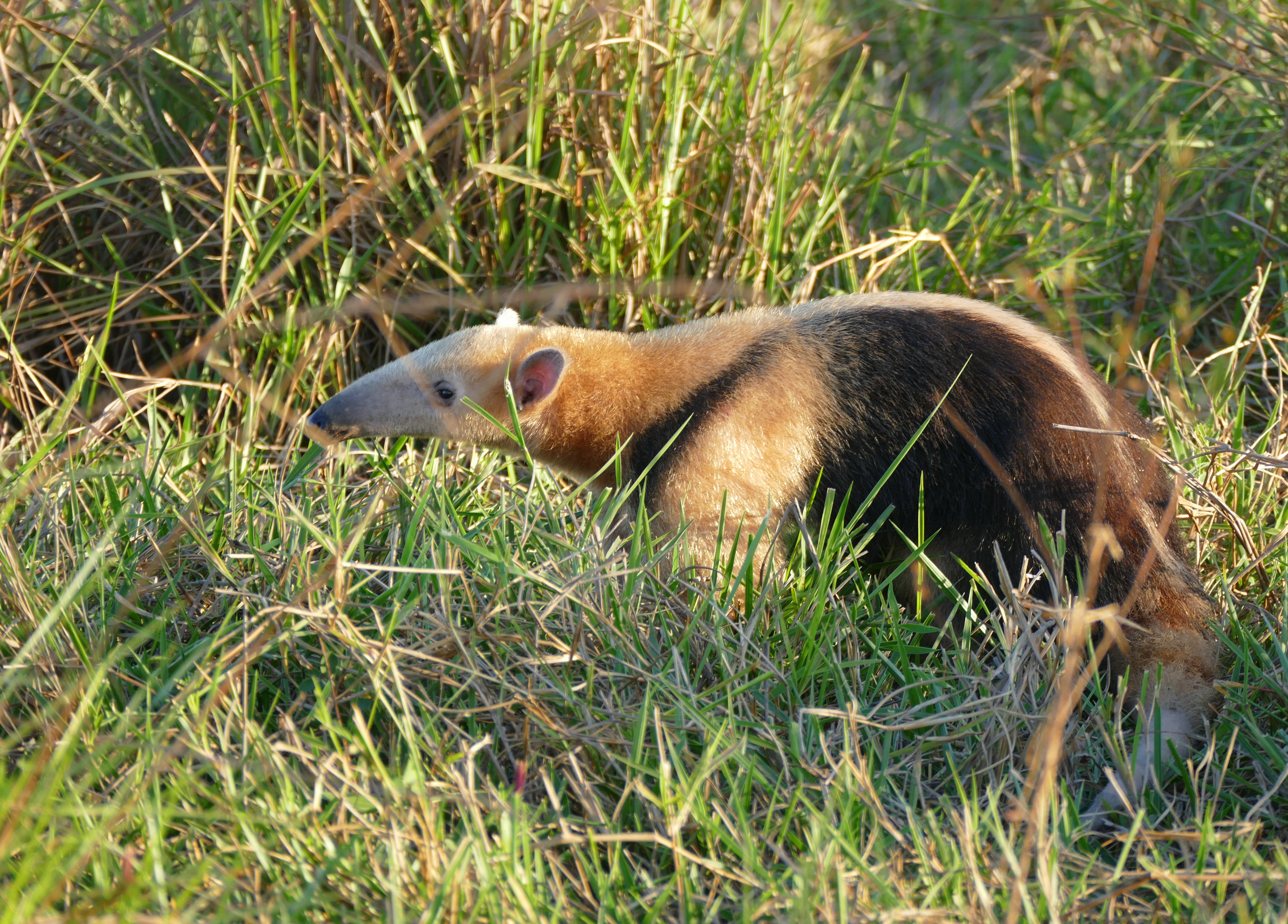 Pousada Piuval, Transpantaneira, Poconé, Mato Grosso, BRAZIL